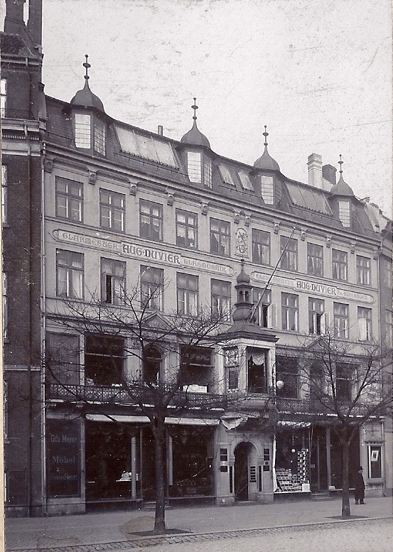 Det Kongelige Bibliotek